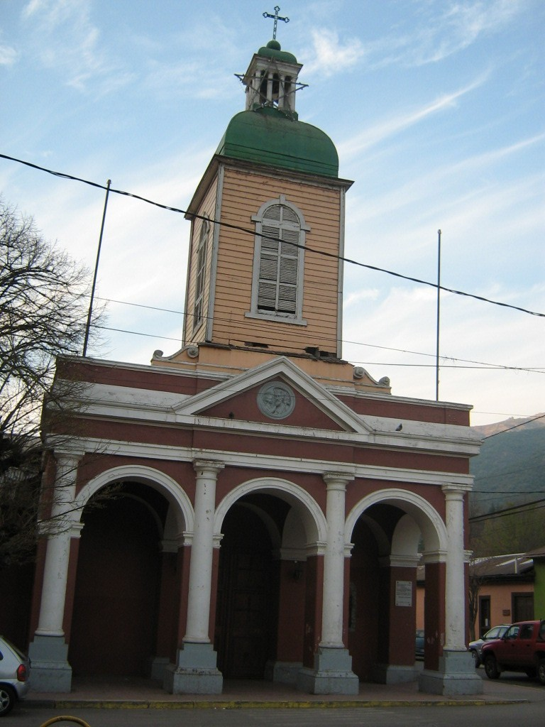 Main Church, san José de Maipo, Chile 1792